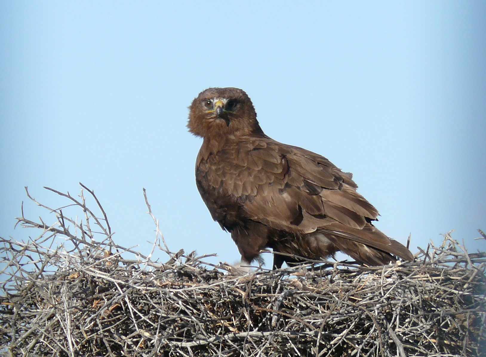 Мохноногий курганник на гнездовой платформе. Республика Тува, 2010.